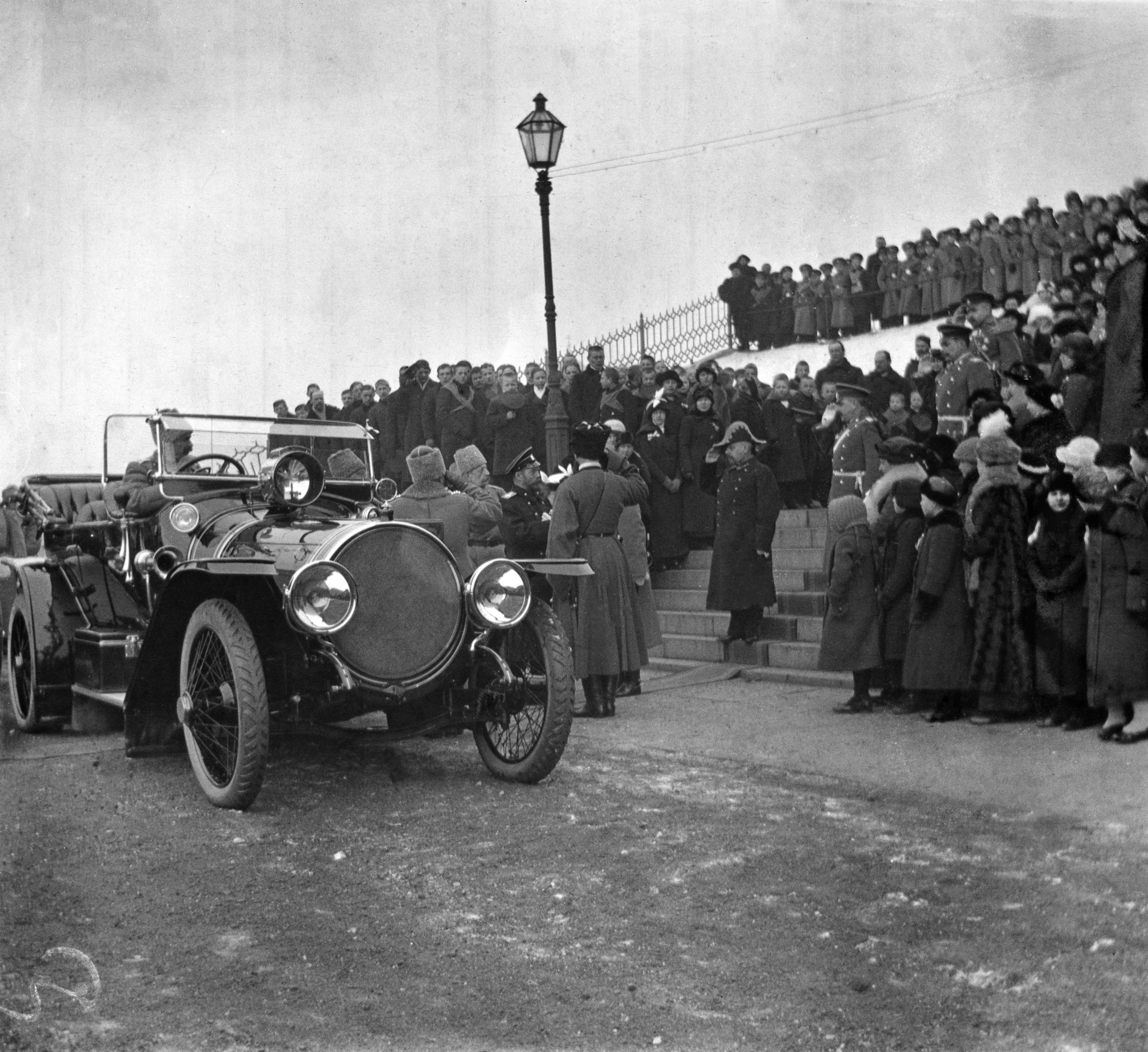 Ensimmäinen maailmansota. Keisari Nikolai II tulossa jumalanpalveluksesta Uspenskin katedraalista. -- negatiivi, nitraatti, mv